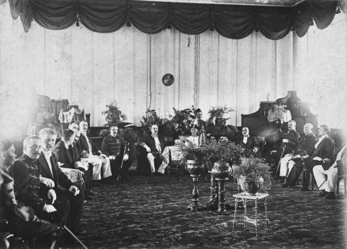 foto. Bezoek van de resident van Riouw aan de Sultan van Lingga Riouw